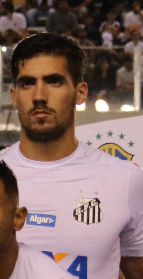 Fofo: Douglas Teixeira/Futebol Santista